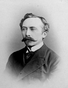 Eestimaa rüütelkonna peamees Reinhold von Rehbinder (1831-1905)